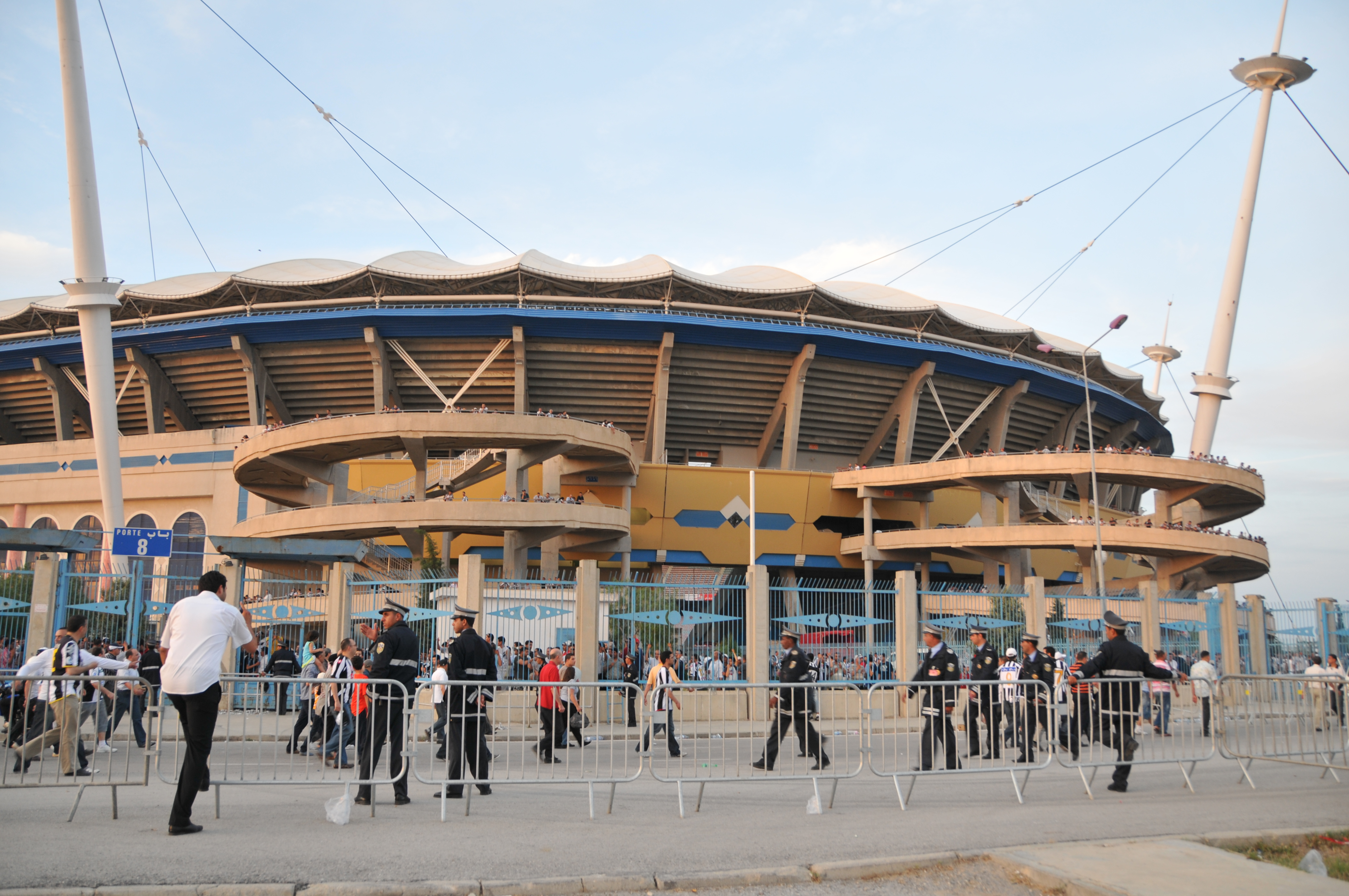 Vue des abords du stade de football de Radès à l'issue du match de la coupe de Tunisie 2009.